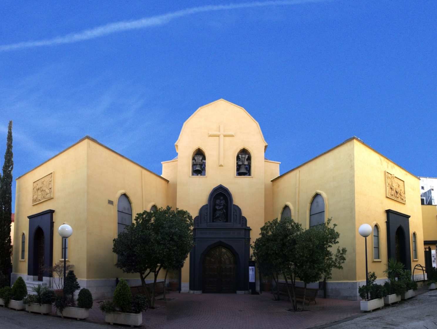 Exterior Sala Juan de La Cruz